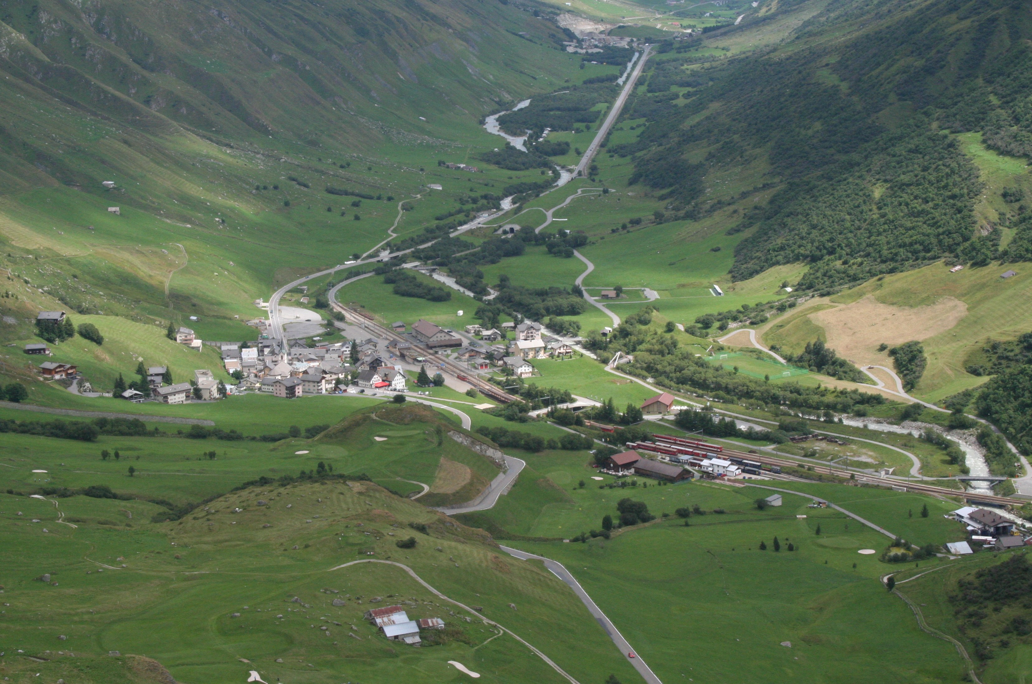 Realp, von der Furkastrasse aus gesehen